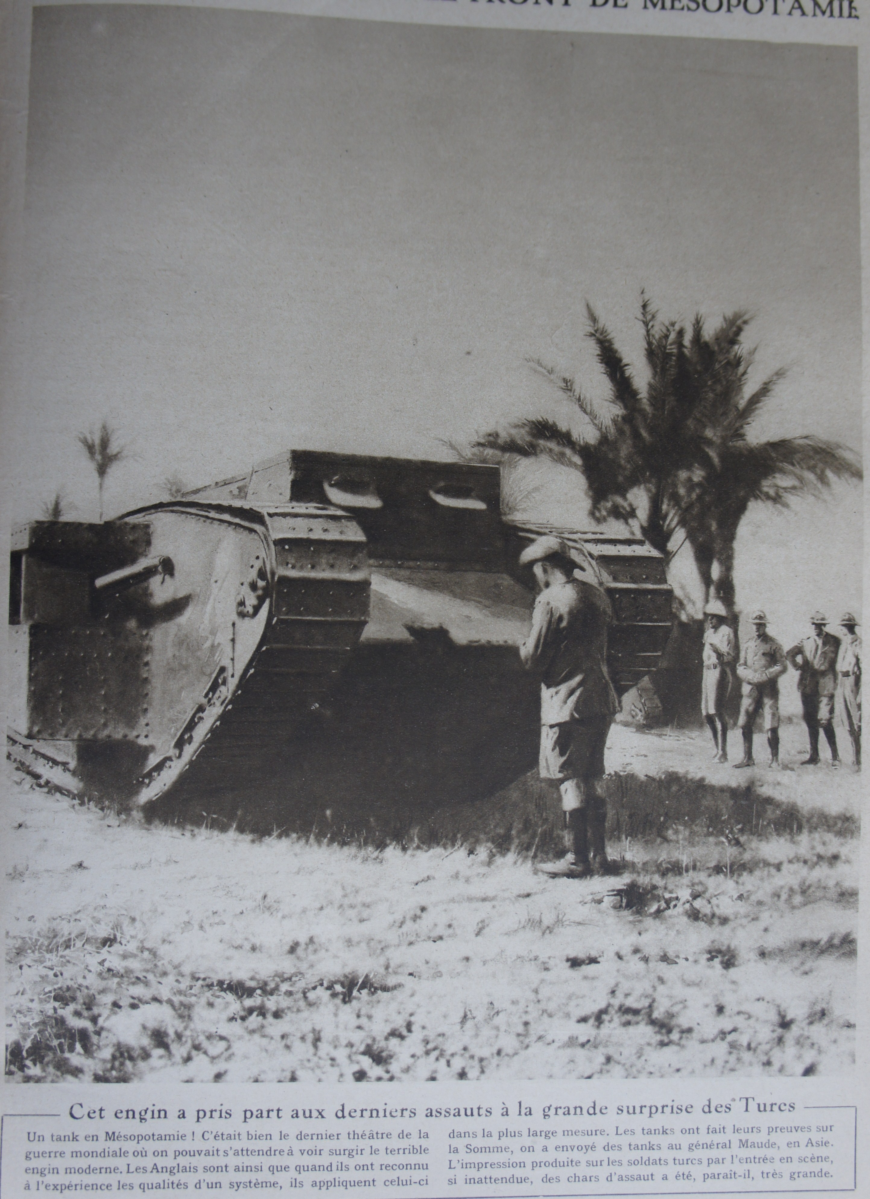 Le Miroir n°184 page 12 : équipages de chars d'assaut .